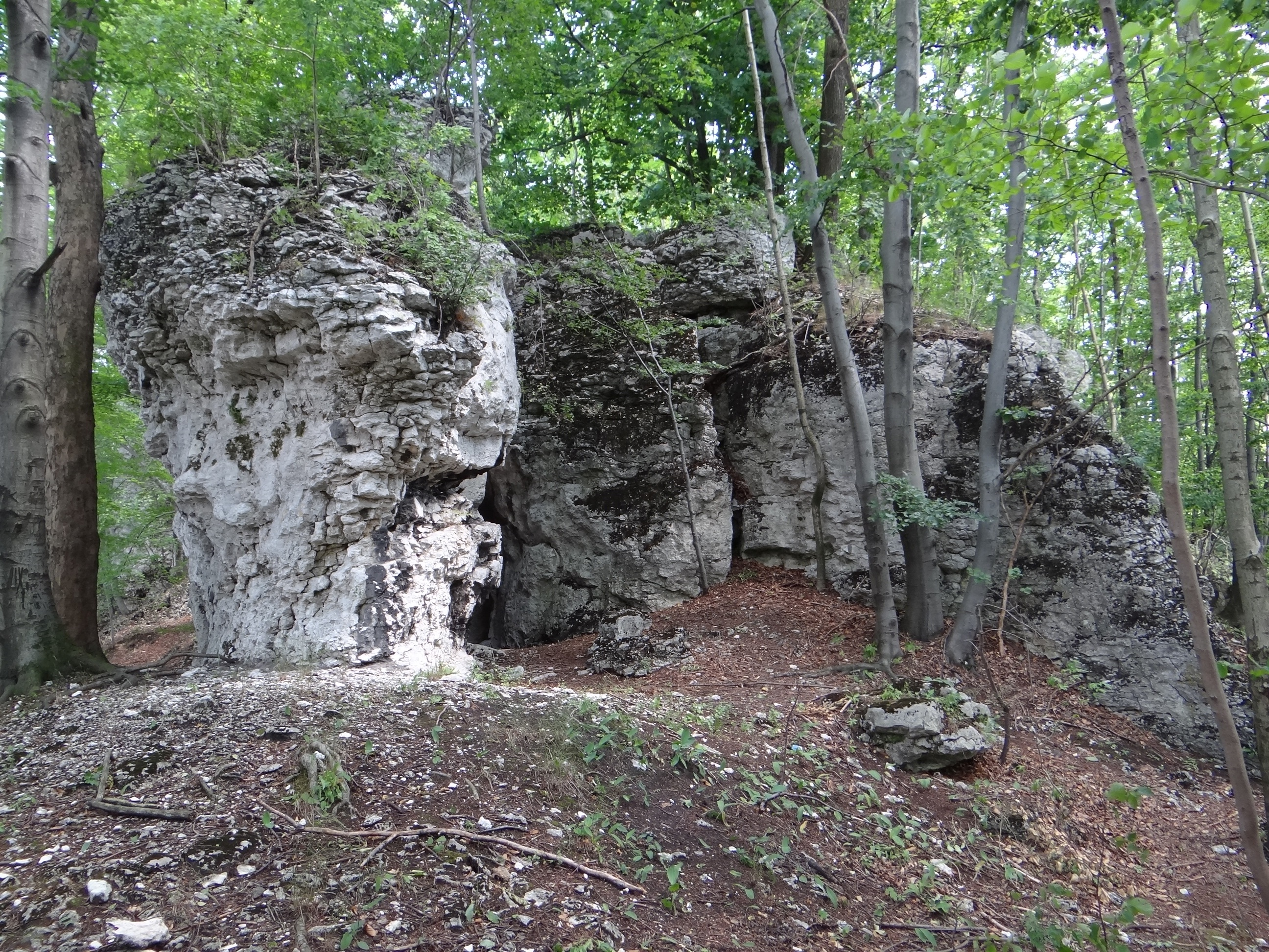 Turnia nad Kopalnią w Jaroszowcu